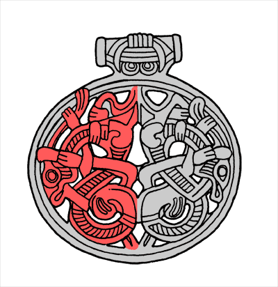 Silberanhänger von Vårby, Schweden im Jelling-Stil. Umzeichnung.